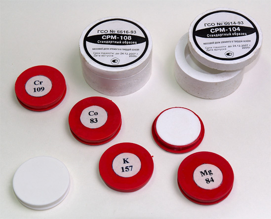 Пробы